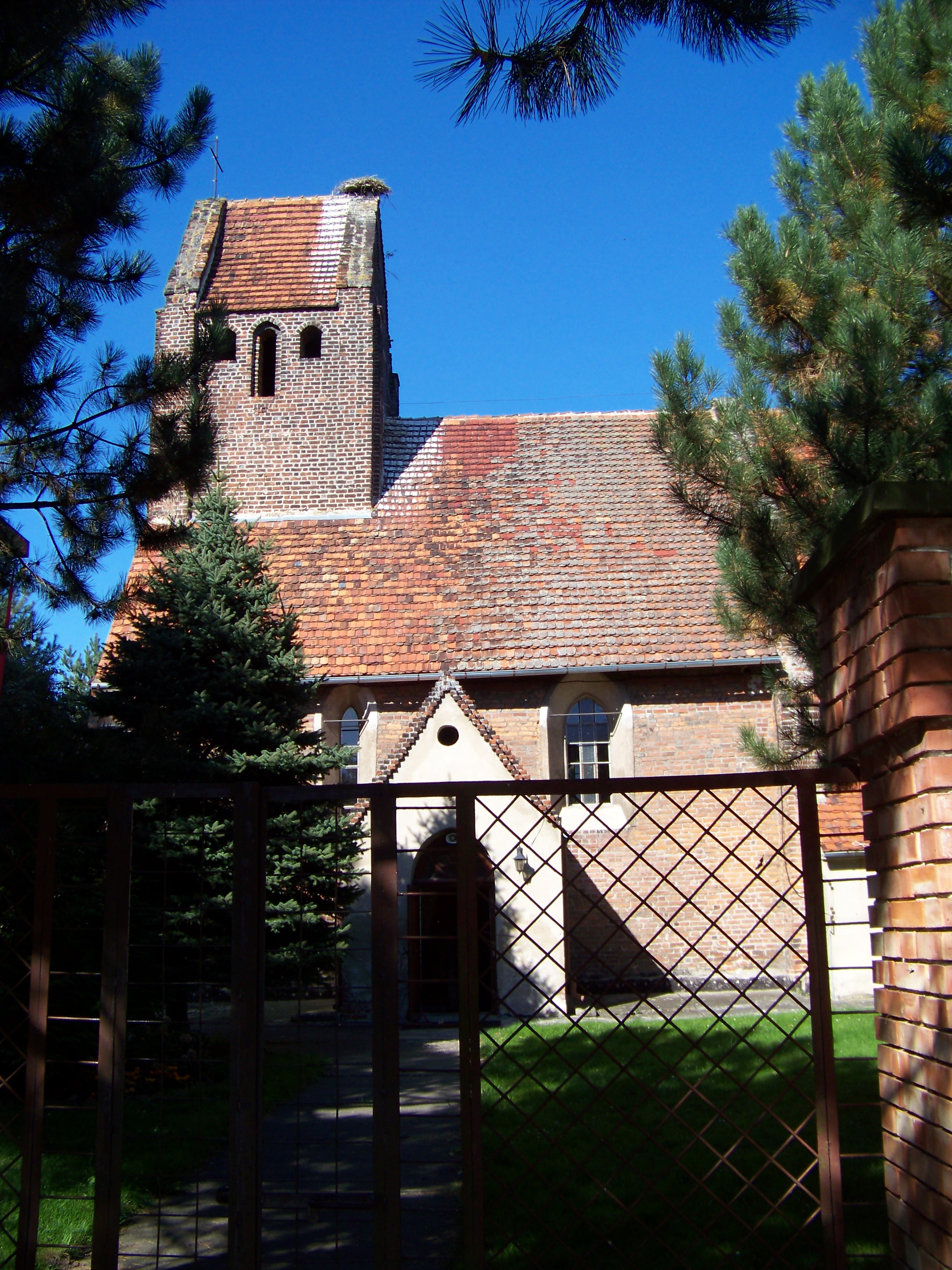 Gierszowice, ul. Pańska 1 - rzymskokatolicki kościół filialny p.w. Matki Boskiej Szkaplerznej, 3 ćw. XIII, 1503, 1710